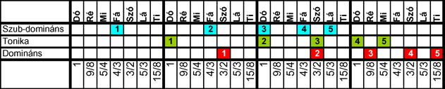 A dúr skála eredete